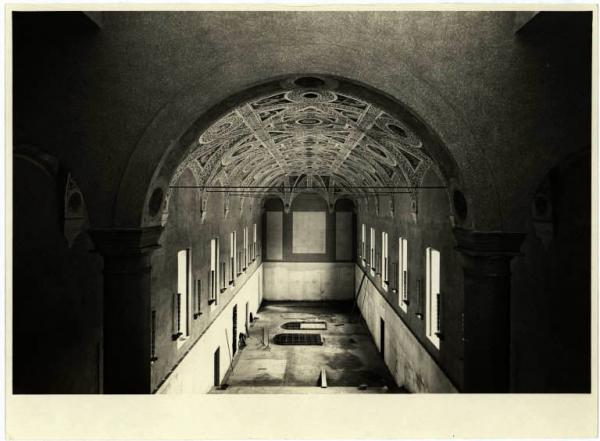 Milano - Università Cattolica - Aula Magna, volta affrescata a trama geometrica